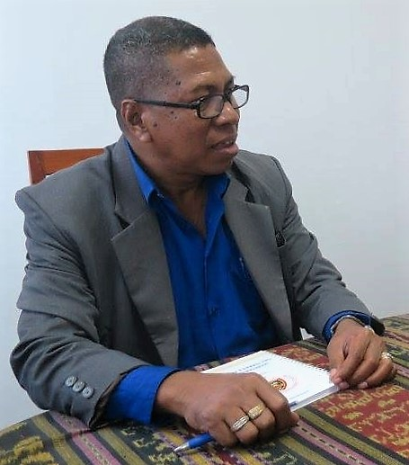 Jaime Xavier Lopes, Staatssekretär für Grundstücke und Eigentum